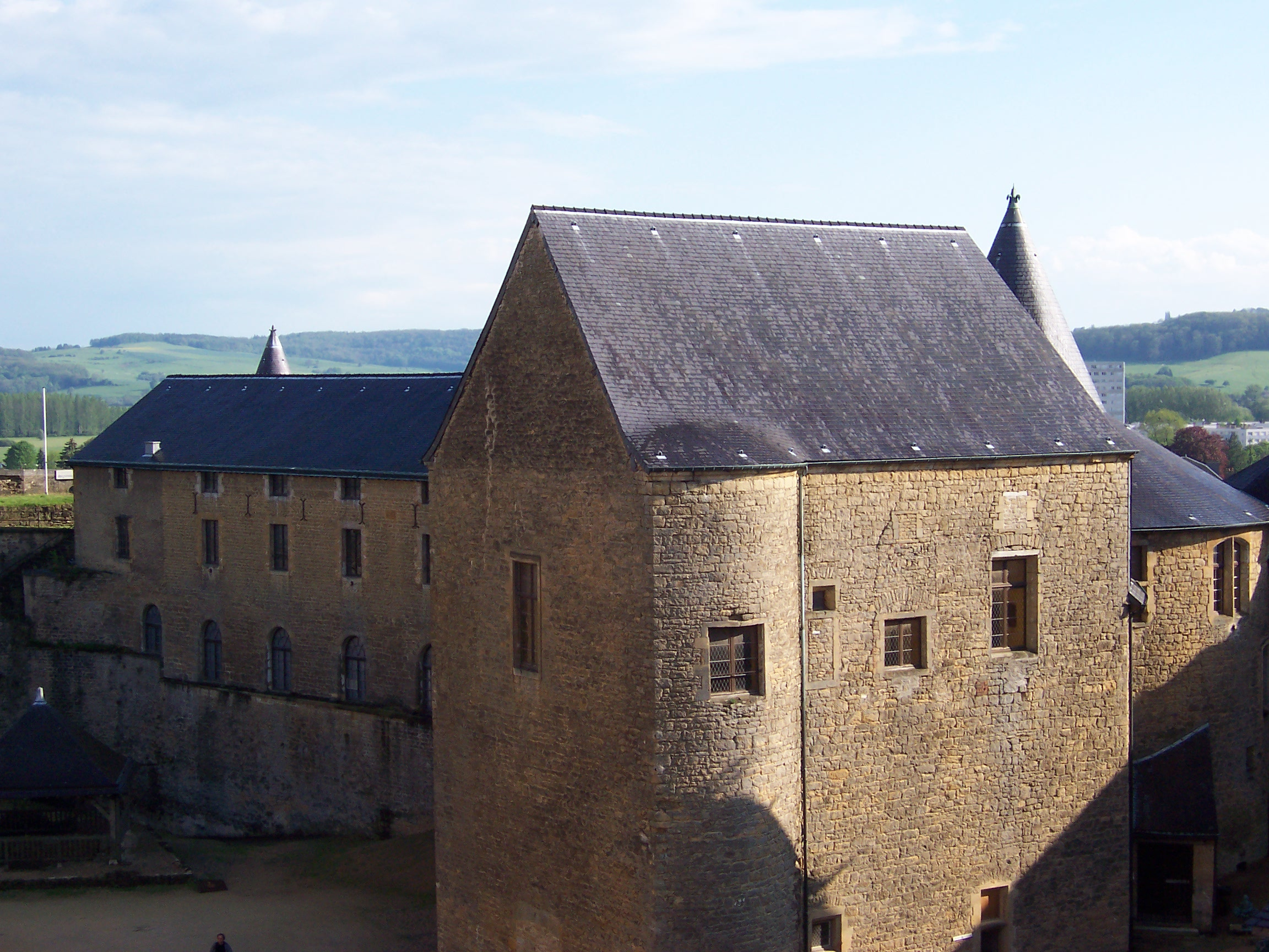 Chateau de Sedan